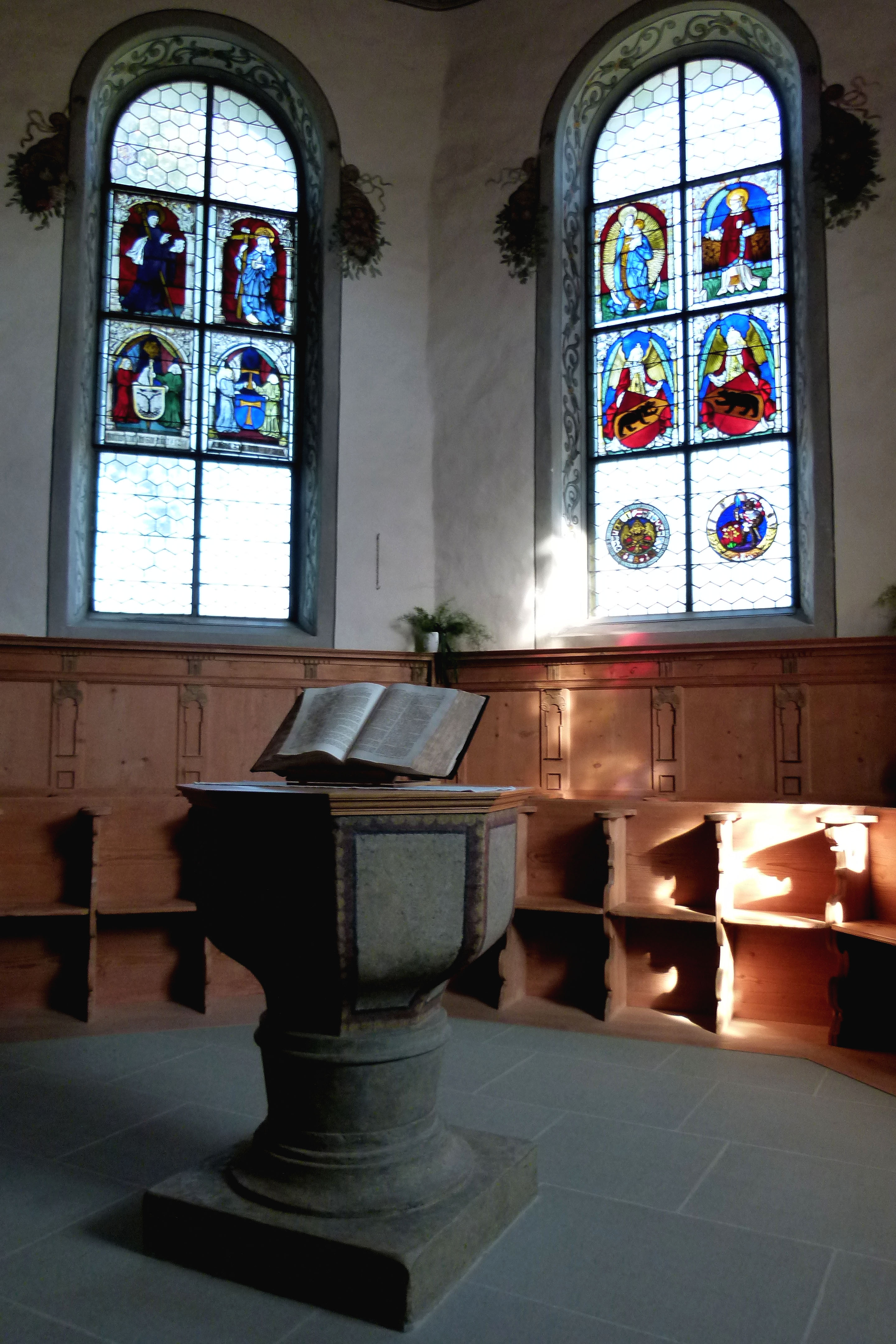 Lauperswil,Kirche, Chorraum mit Taufstein.